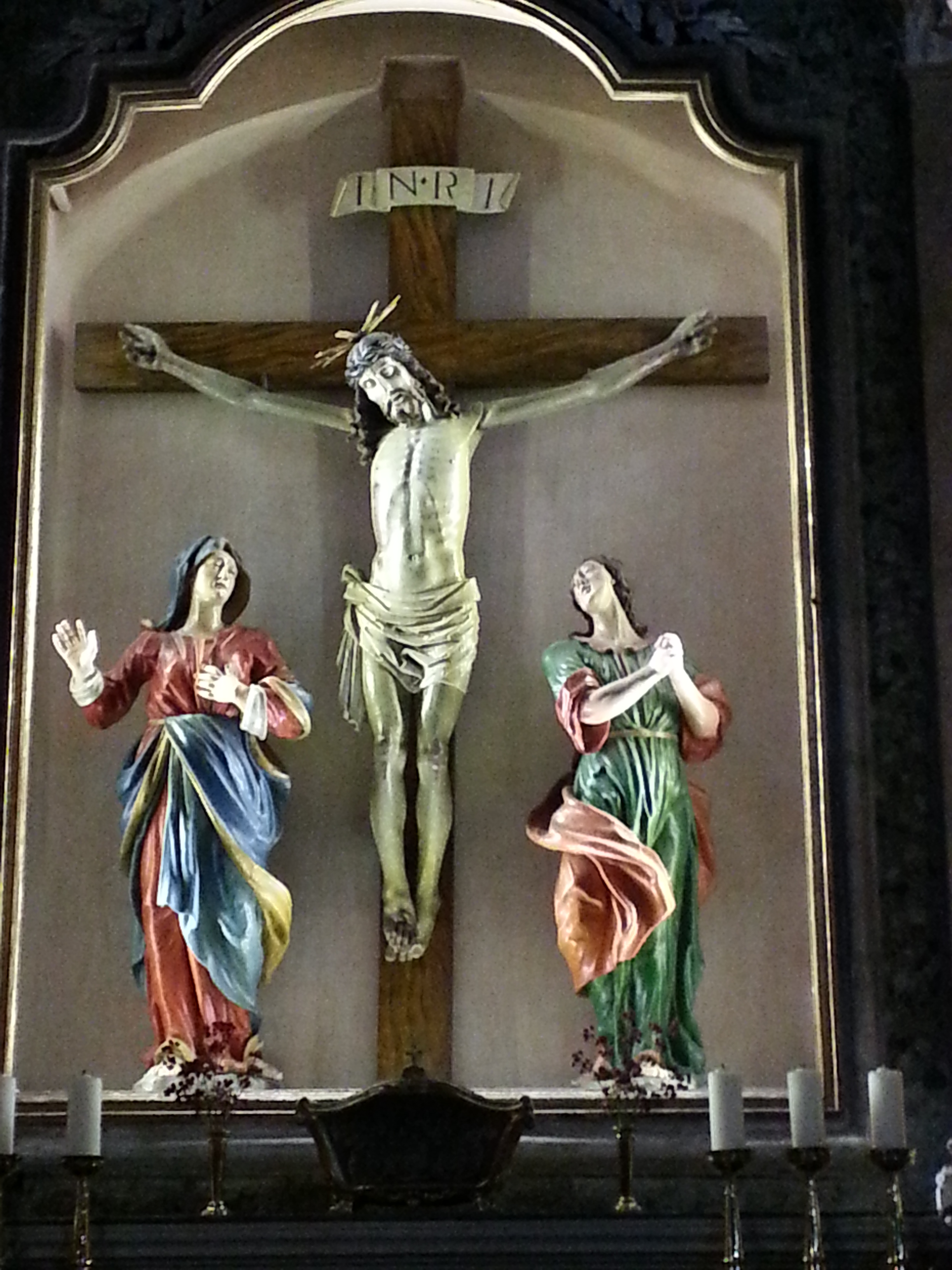 Altare del Crocifisso-Chiesa del Paradiso-Clusone